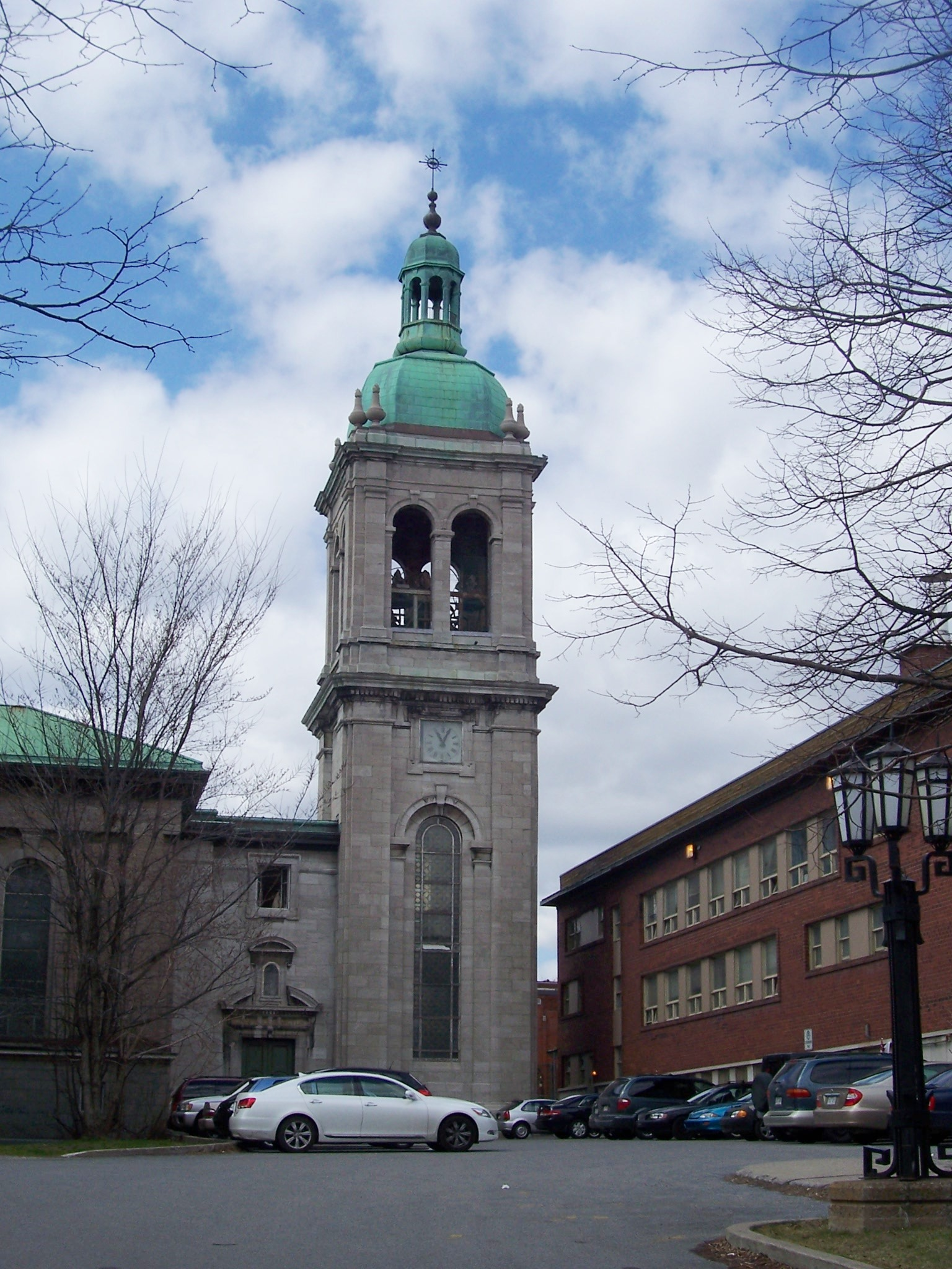 Photo du campanile de l'église Notre-Dame de Grâce (Montréal). IL s'agit d'un ajout de 1927